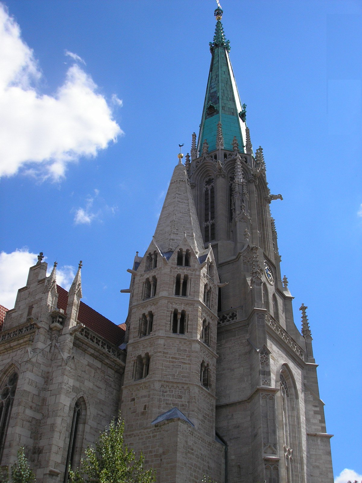 Der romanische Nordturm der Marienkirche in Mühlhausen (Thüringen).